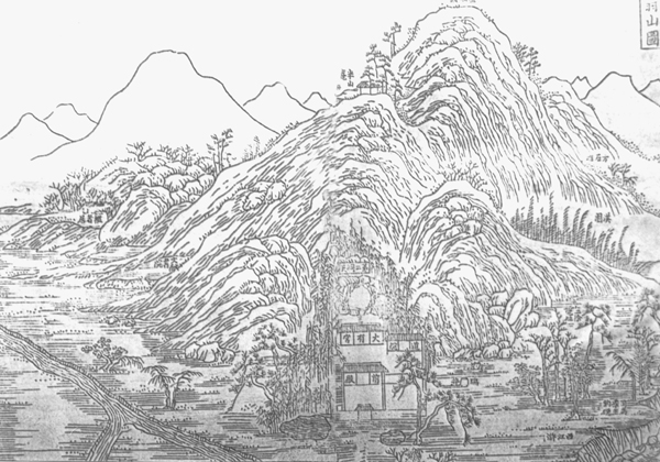 中文（中国大陆）: 清代委羽山图